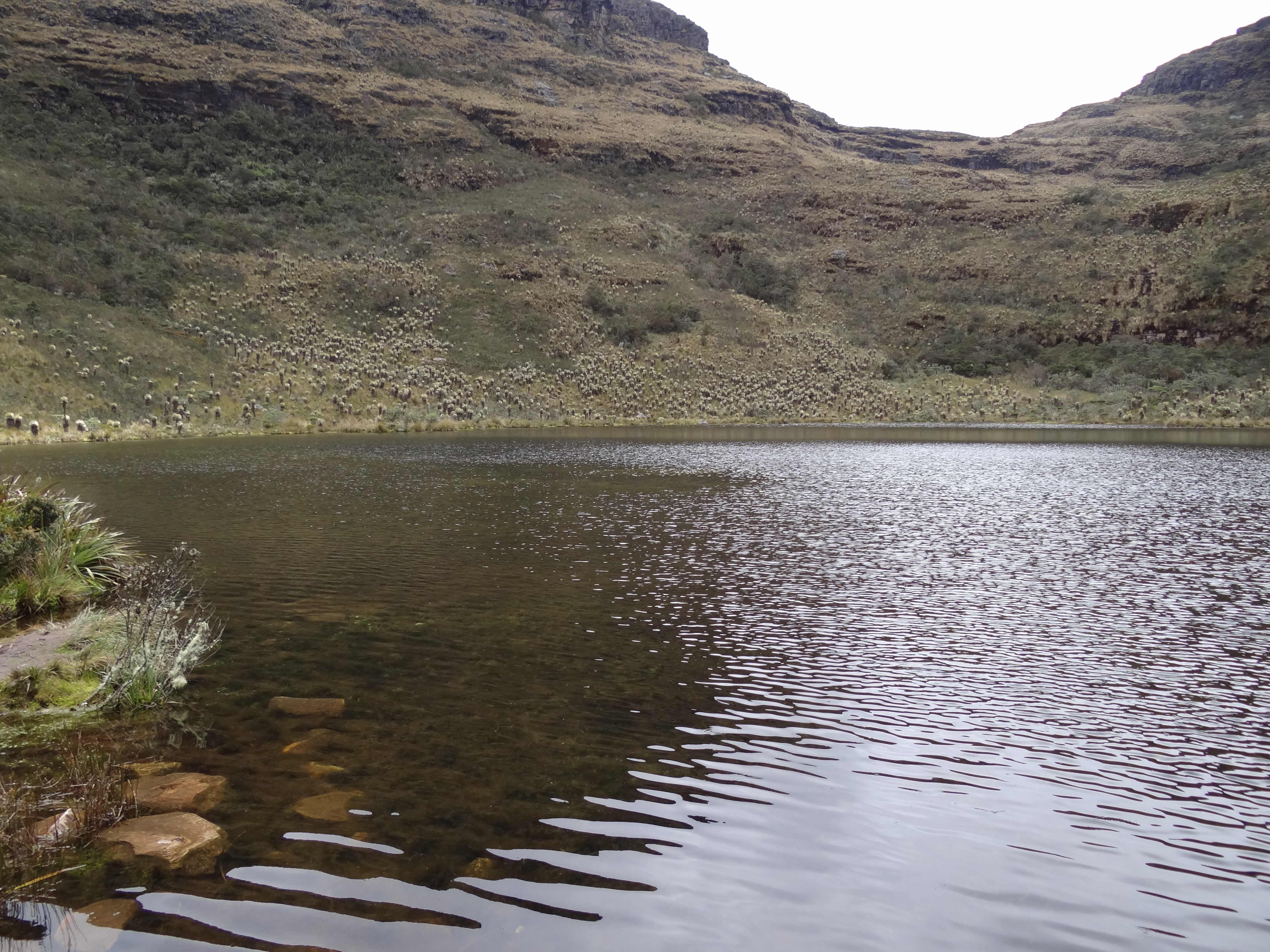 Laguna de Iguaque en el Santuario de fauna y flora Iguaque, departamento de Boyacá, Colombia